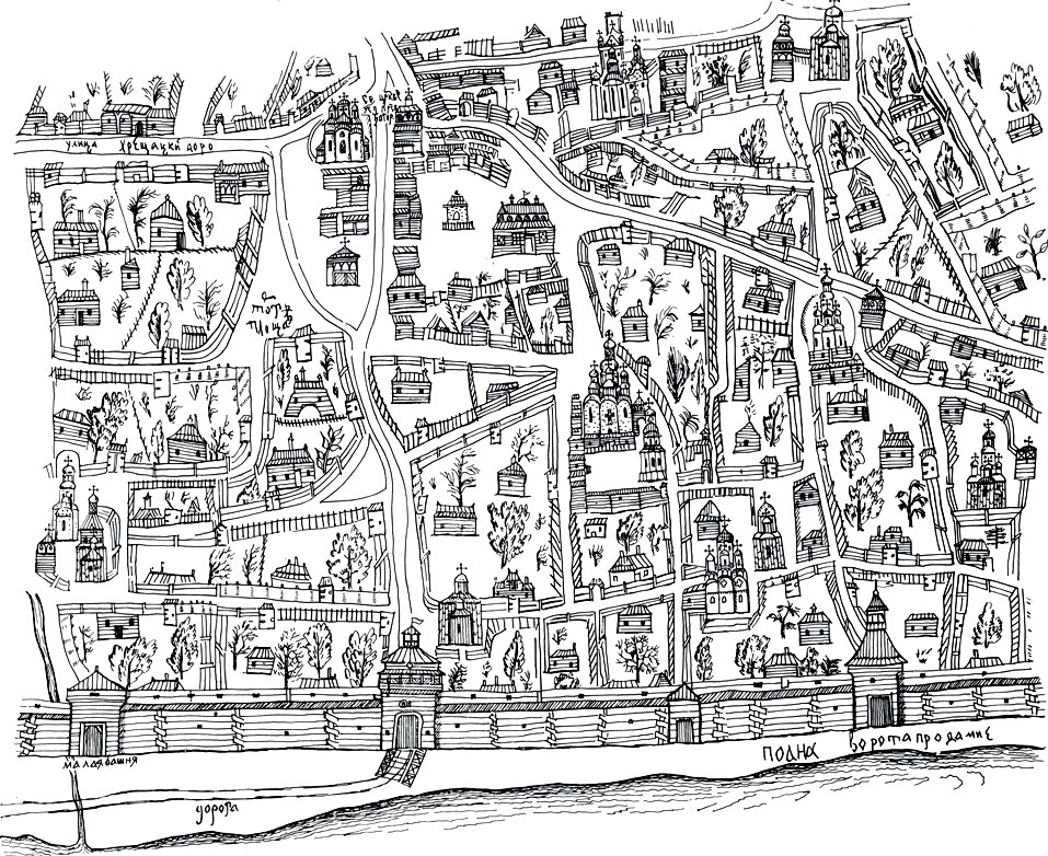 План Печерська І.Ушакова 1695